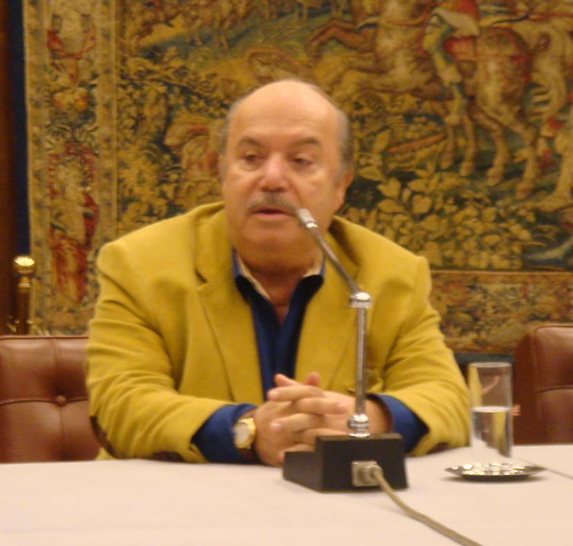 L'attore Lino Banfi nel corso di una conferenza stampa. Foto di Stefano Bolognini. Roma 2006.